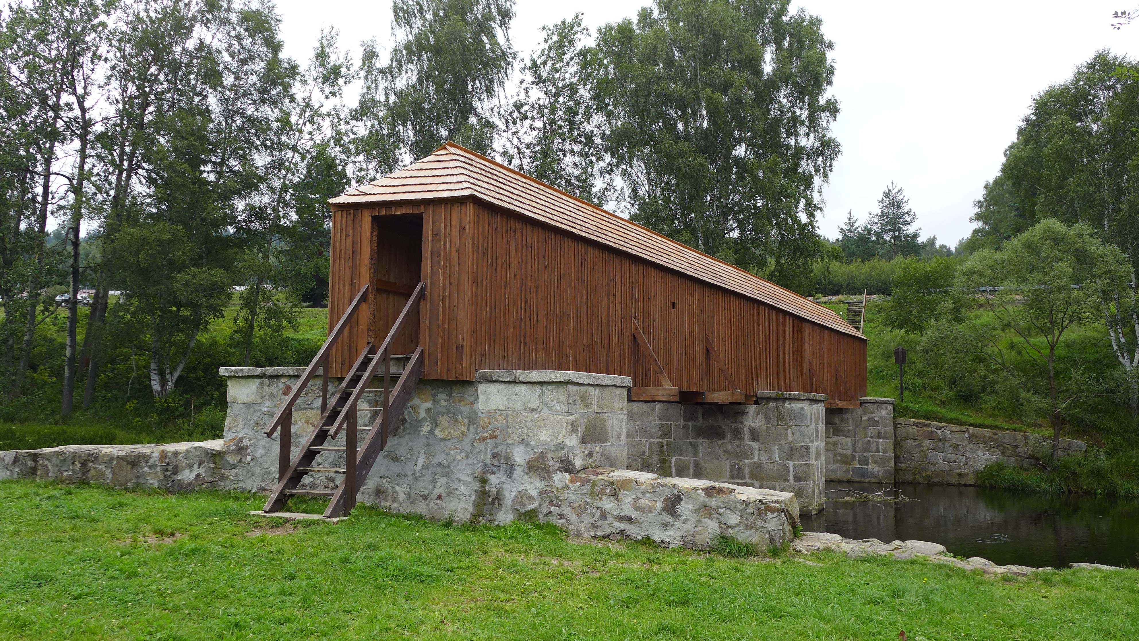 Krytá lávka, přes řeku Vltavu, Lenora.